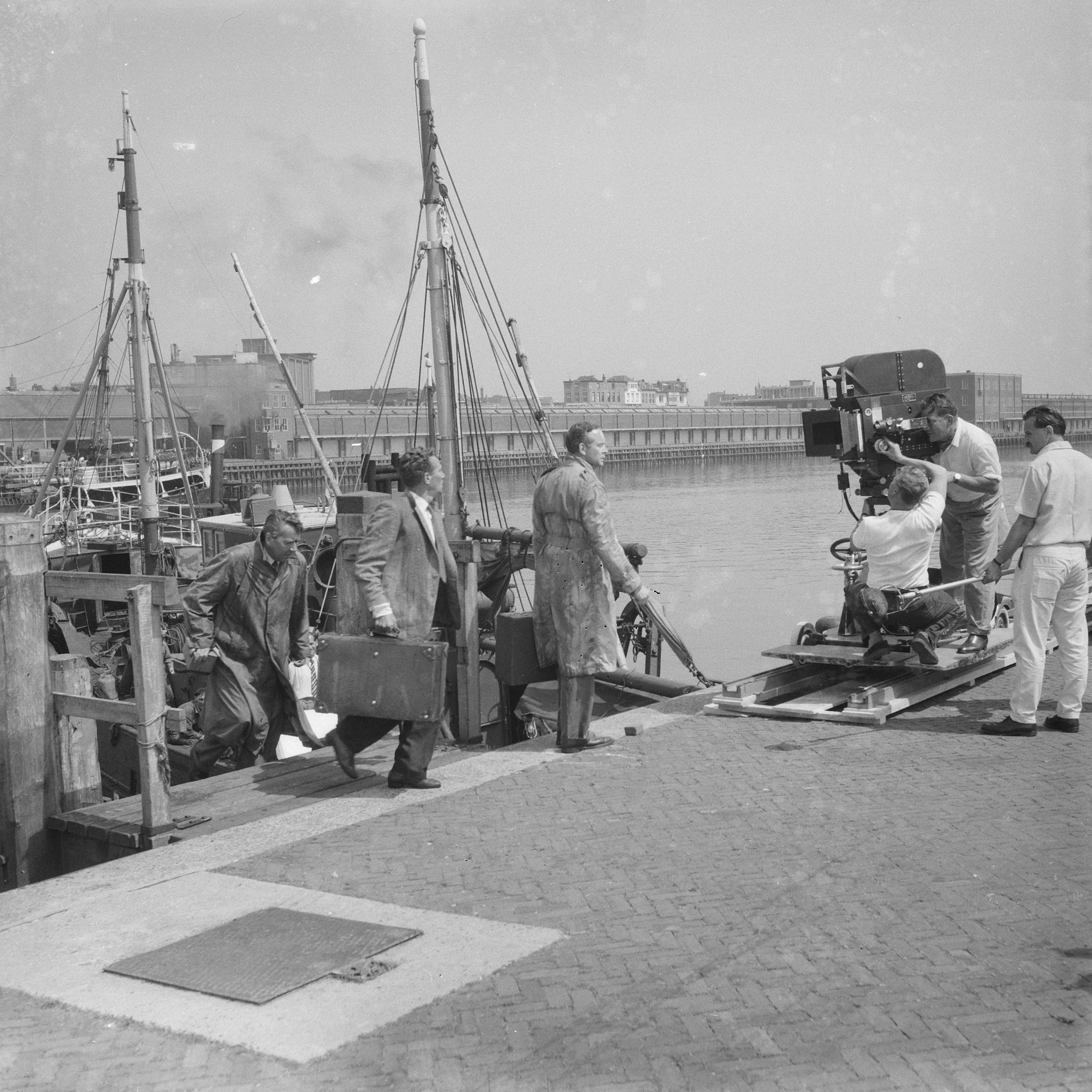 Collectie / Archief : Fotocollectie Anefo Reportage / Serie : [ onbekend ] Beschrijving : Filmopnamen voor de Rankfilm "Operation Amsterdam" in IJmuiden, v.l.n.r.: Peter Knox, Peter Finch , Tony Britton Annotatie : De film ging op 12 januari 1959 in Londen in première Datum : 8 juli 1958 Locatie : IJmuiden Trefwoorden : acteurs, films, filmsterren, opnamen Persoonsnaam : Britton Tony, Finch Peter, Knox Peter Fotograaf : Noske, J.D. / Anefo Auteursrechthebbende : Nationaal Archief Materiaalsoort : Negatief (zwart/wit) Nummer archiefinventaris : bekijk toegang 2.24.01.03 Bestanddeelnummer : 909-6971